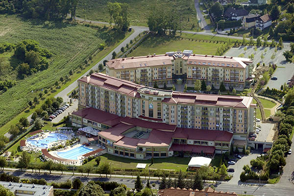 Zalakaros légi fotó